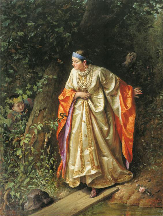 Сергей Грибков "Прятки" 1893